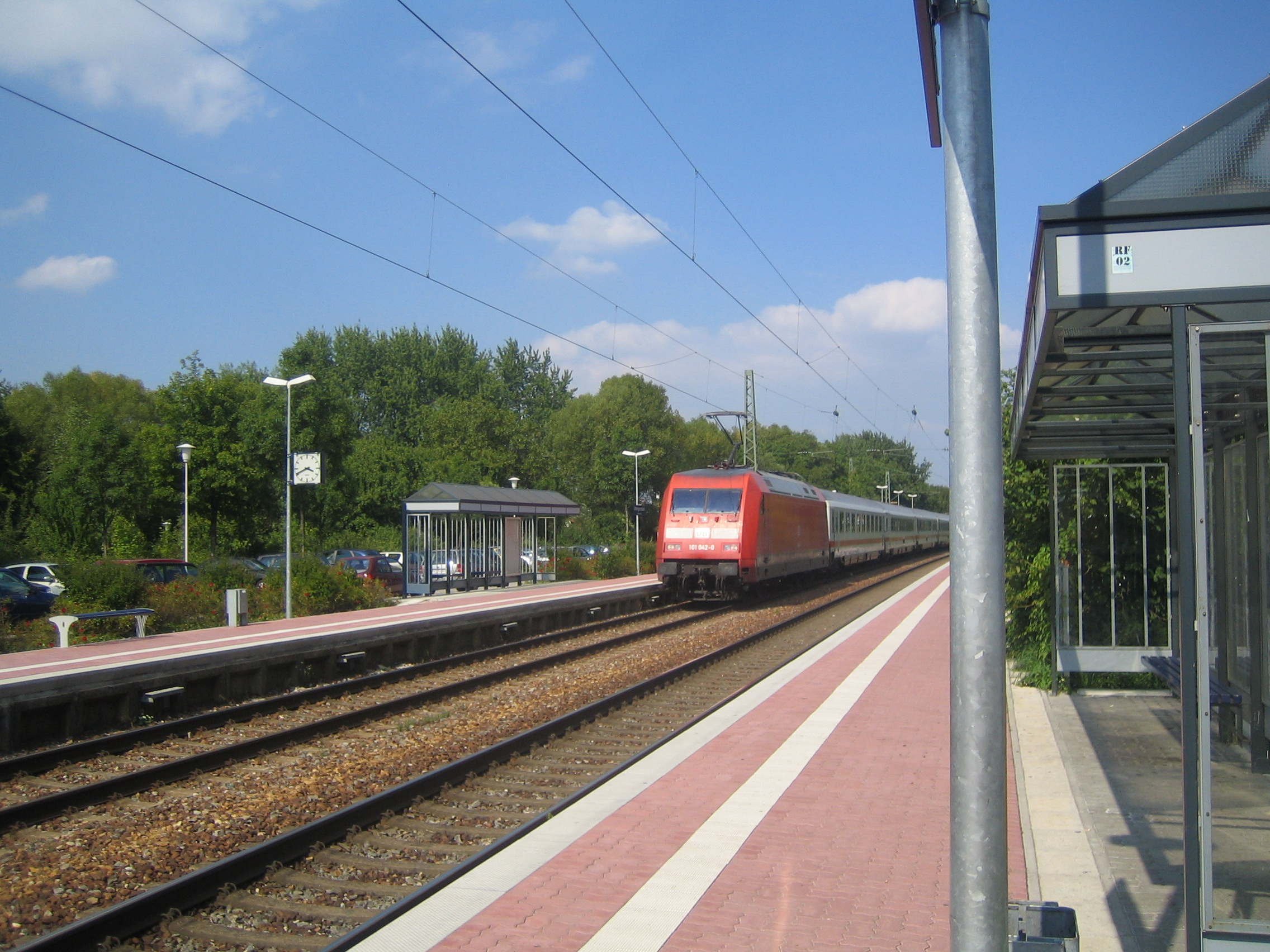 Zug bei der Durchfahrt in Untergrombach